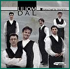 A Banchieri Énekegyüttes 1998-as CD lemeze